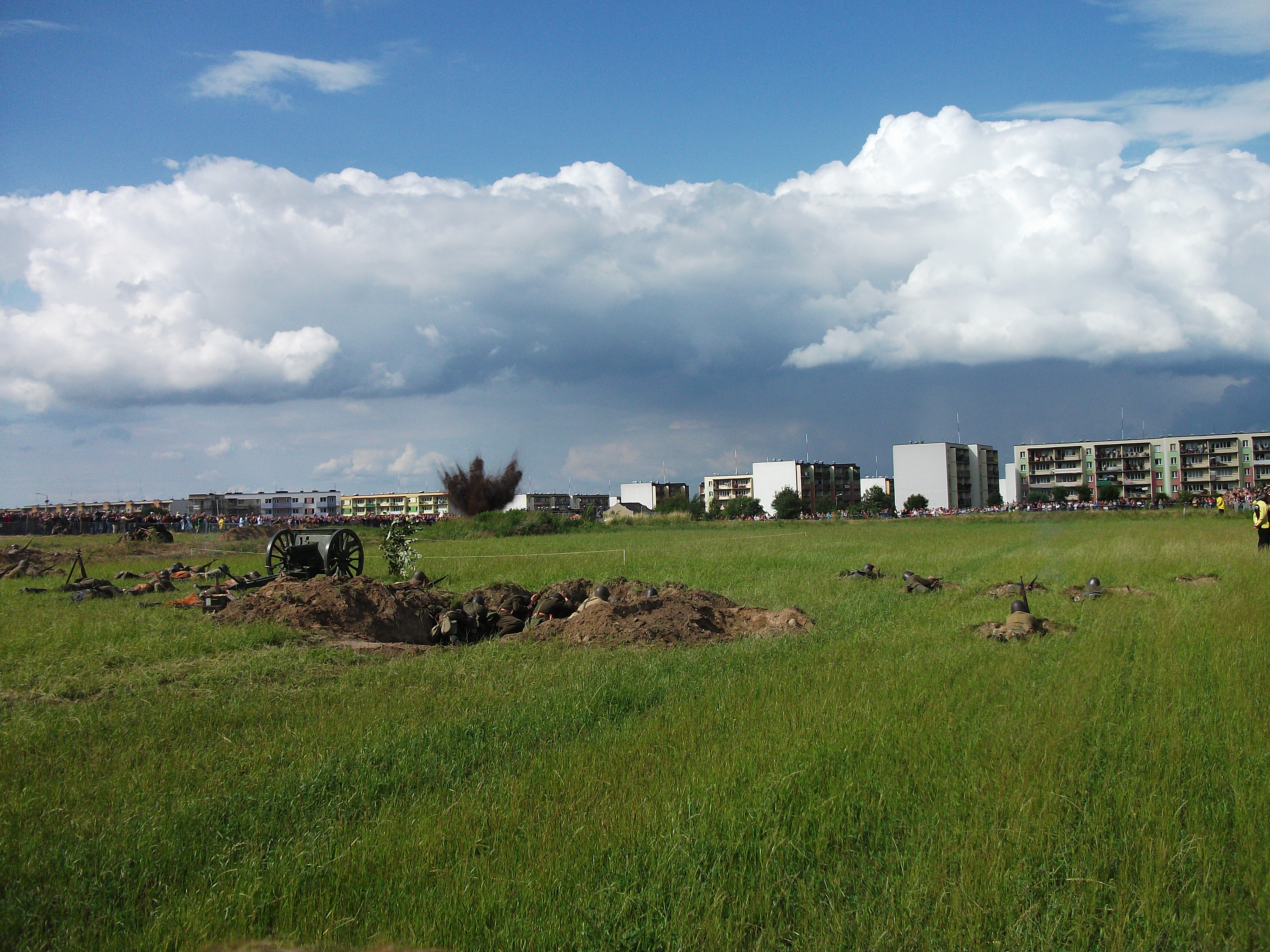 Fragment osiedla Stare Sady. Widowisko - rekonstrukcja bitwy kampanii wrześniowej